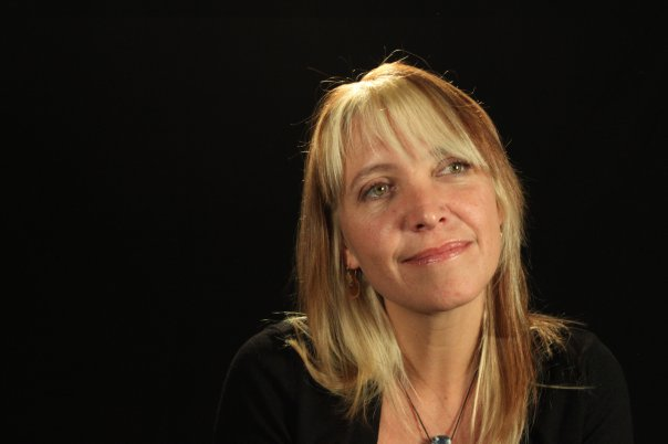 Durante la grabación del documental "Alma"